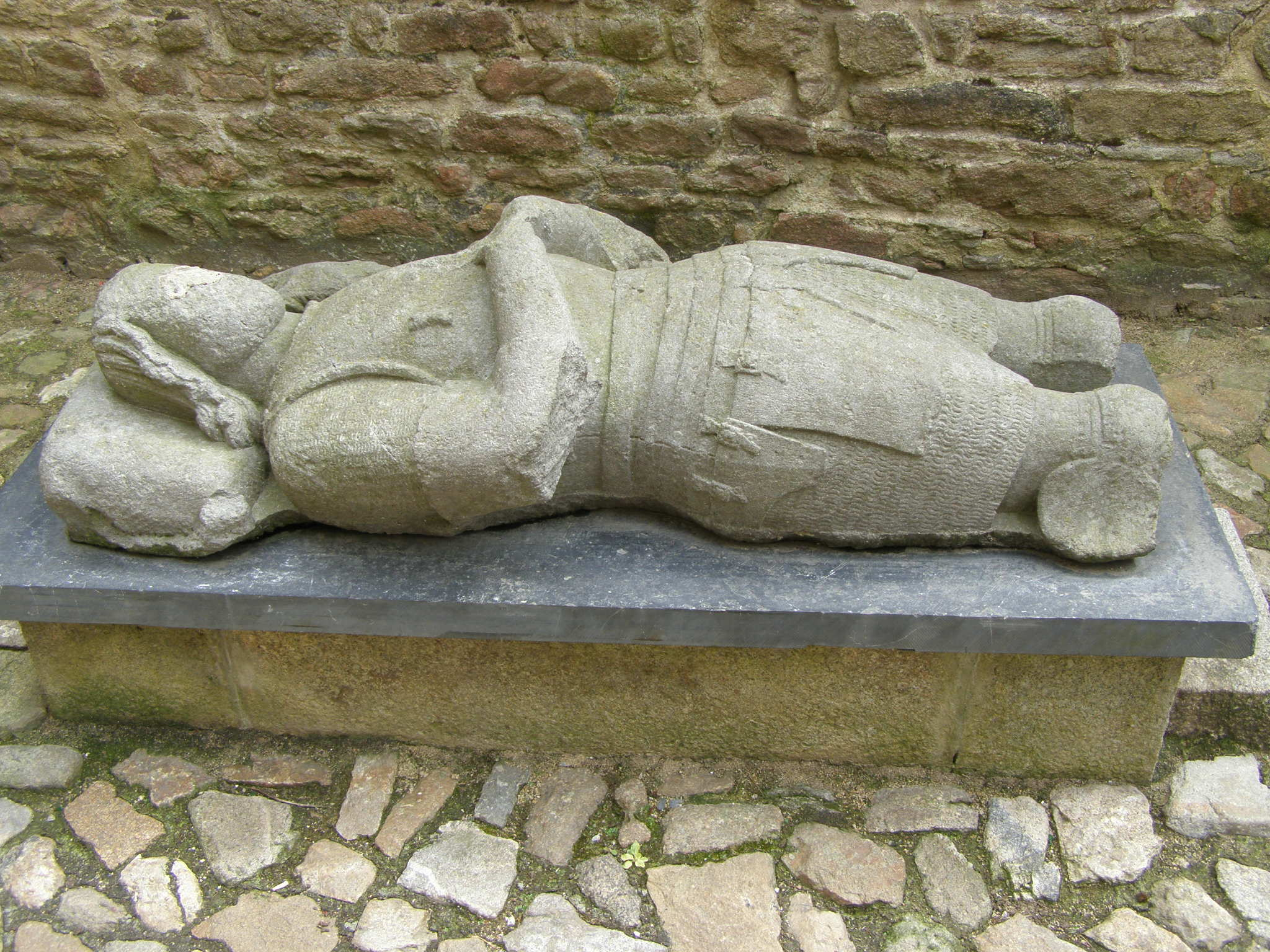 Gisant de François de Tournemine - maison prébendale de Saint Pol de Léon